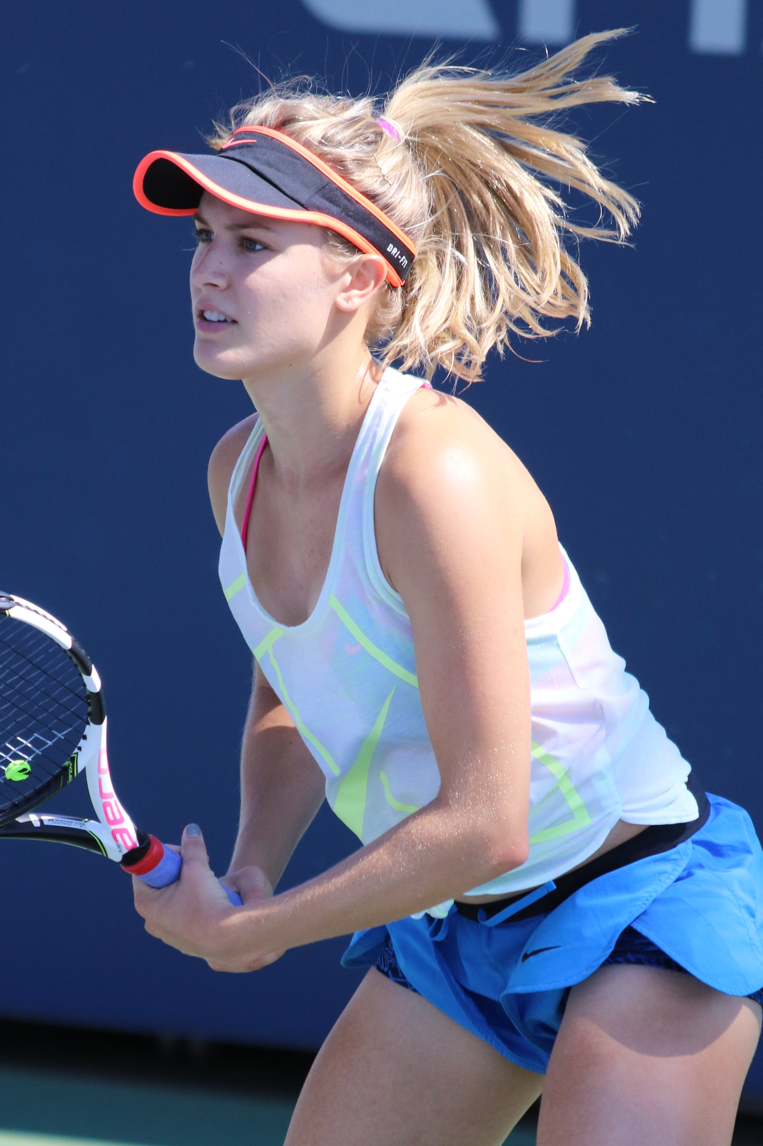 Bouchard US16 (15)